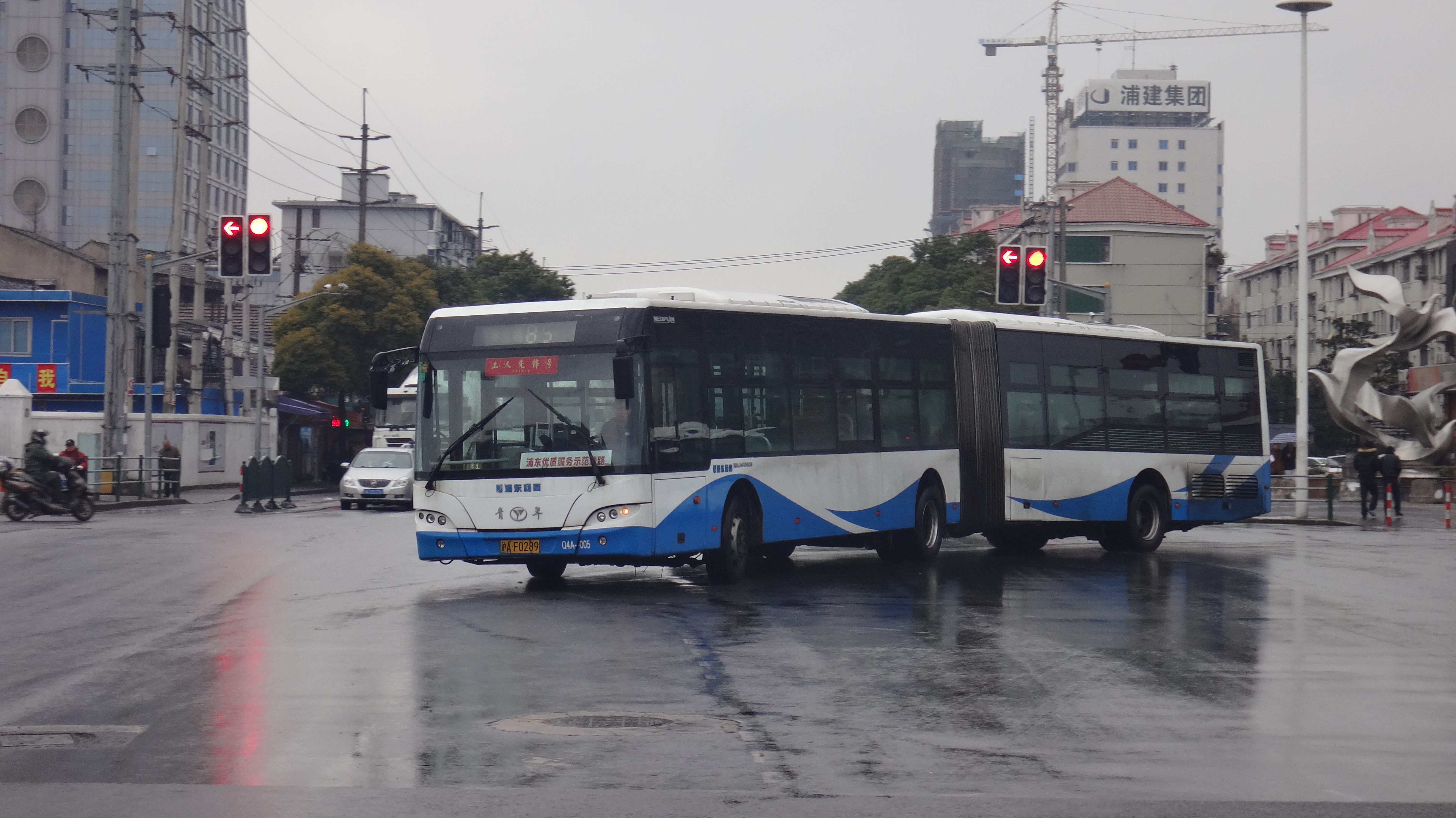 上海公交85路，自编号Q4A-005，车型JNP6180G，摄于金桥路浦东大道。